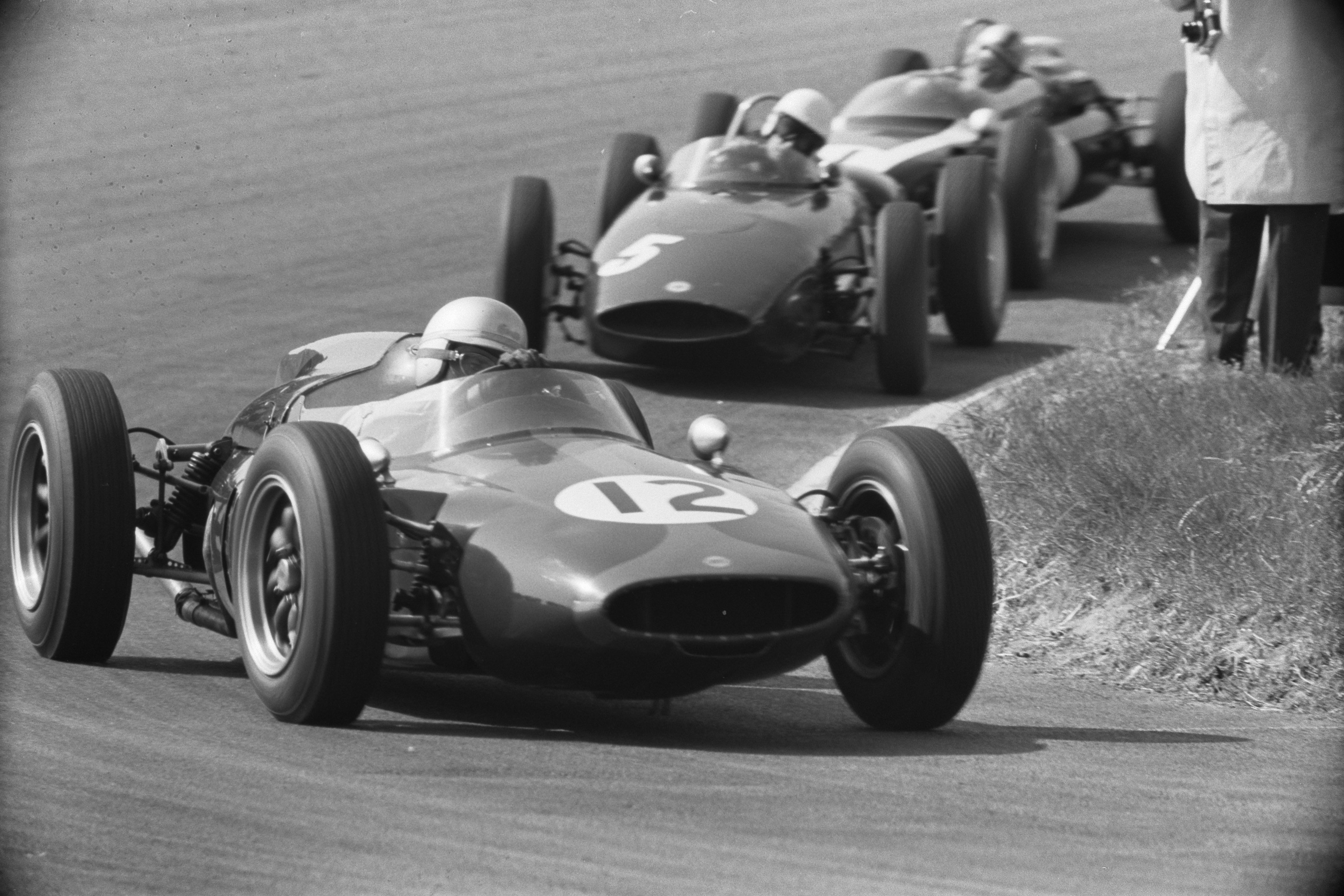 Grand Prix te Zandvoort. Wagens op de baan.